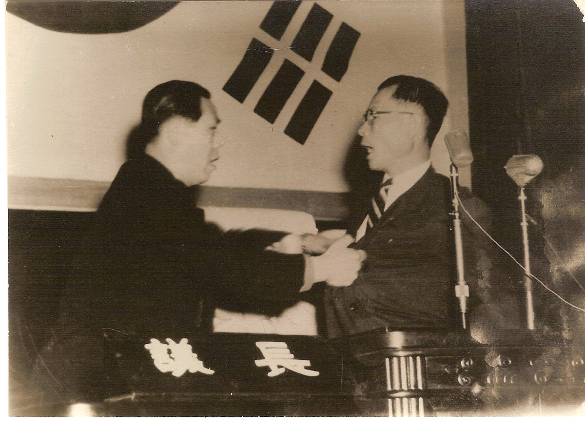 사사오입 부정개헌에 항의하여 국회부의장 최순주의 멱살을 잡은 이철승 국회의원